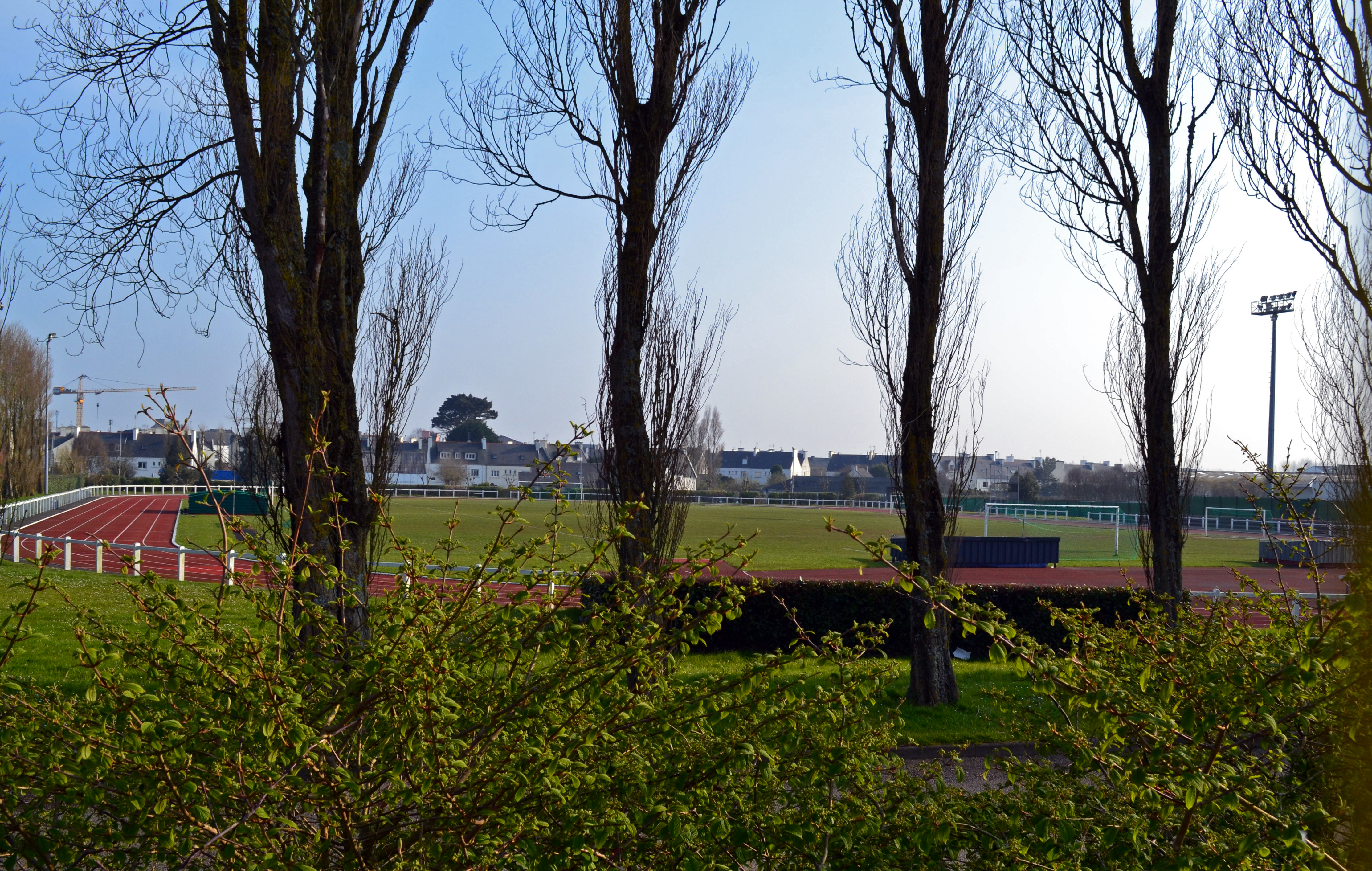 Piste d'athlétisme 400 m, rue des Carmes, à Saint-Pol-de-Léon (Finistère, Bretagne, France).